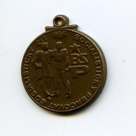 Bronzový odznak člena Brigády socialistické práce